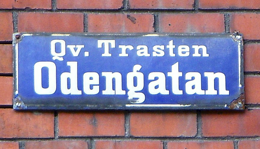 Äldre gatuskylt "Odengatan" i Stockholm